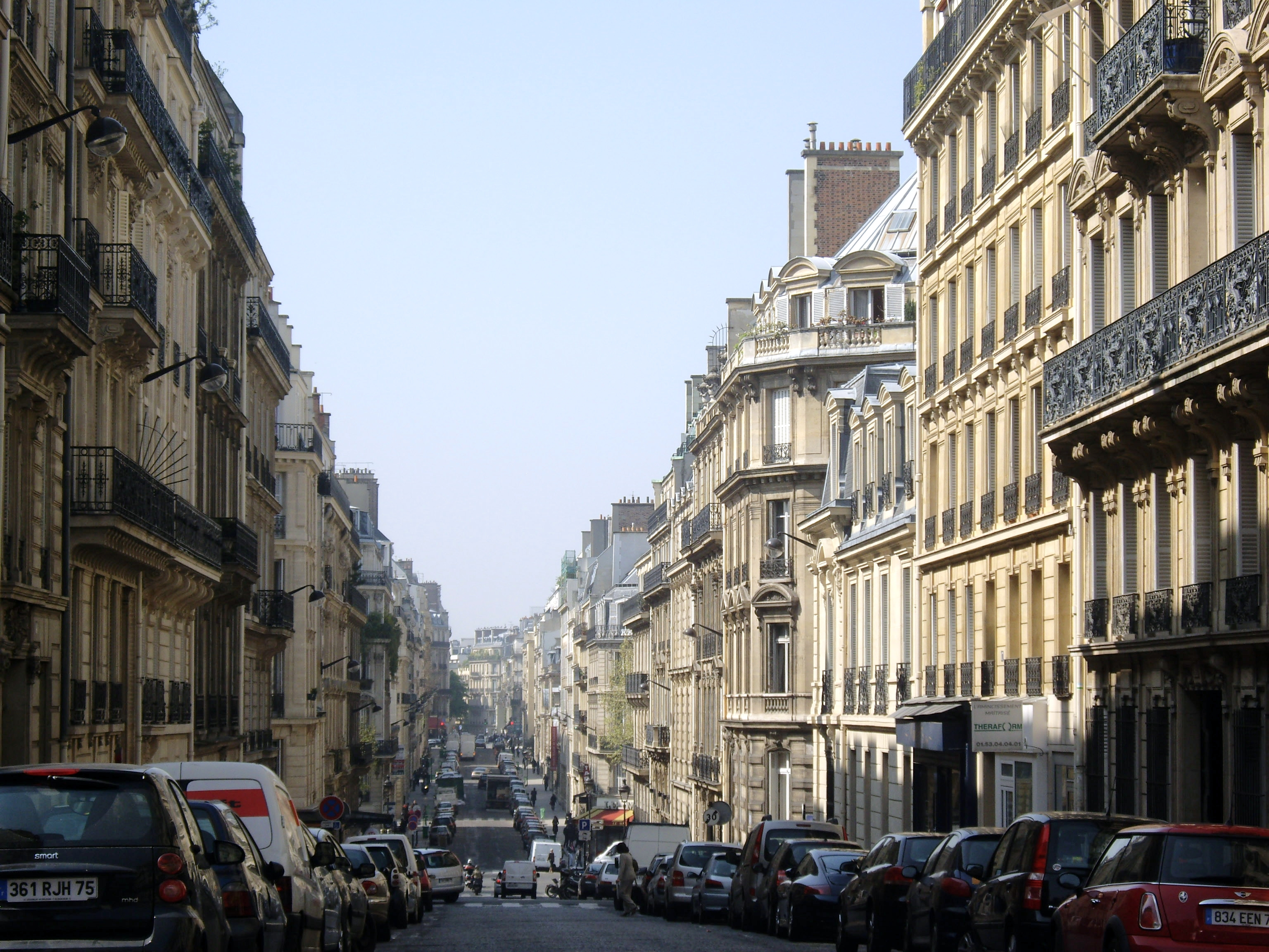 Rue de Monceau, Paris 8e. Vue depuis la rue du Général-Foy, vers le boulevard Haussmann.